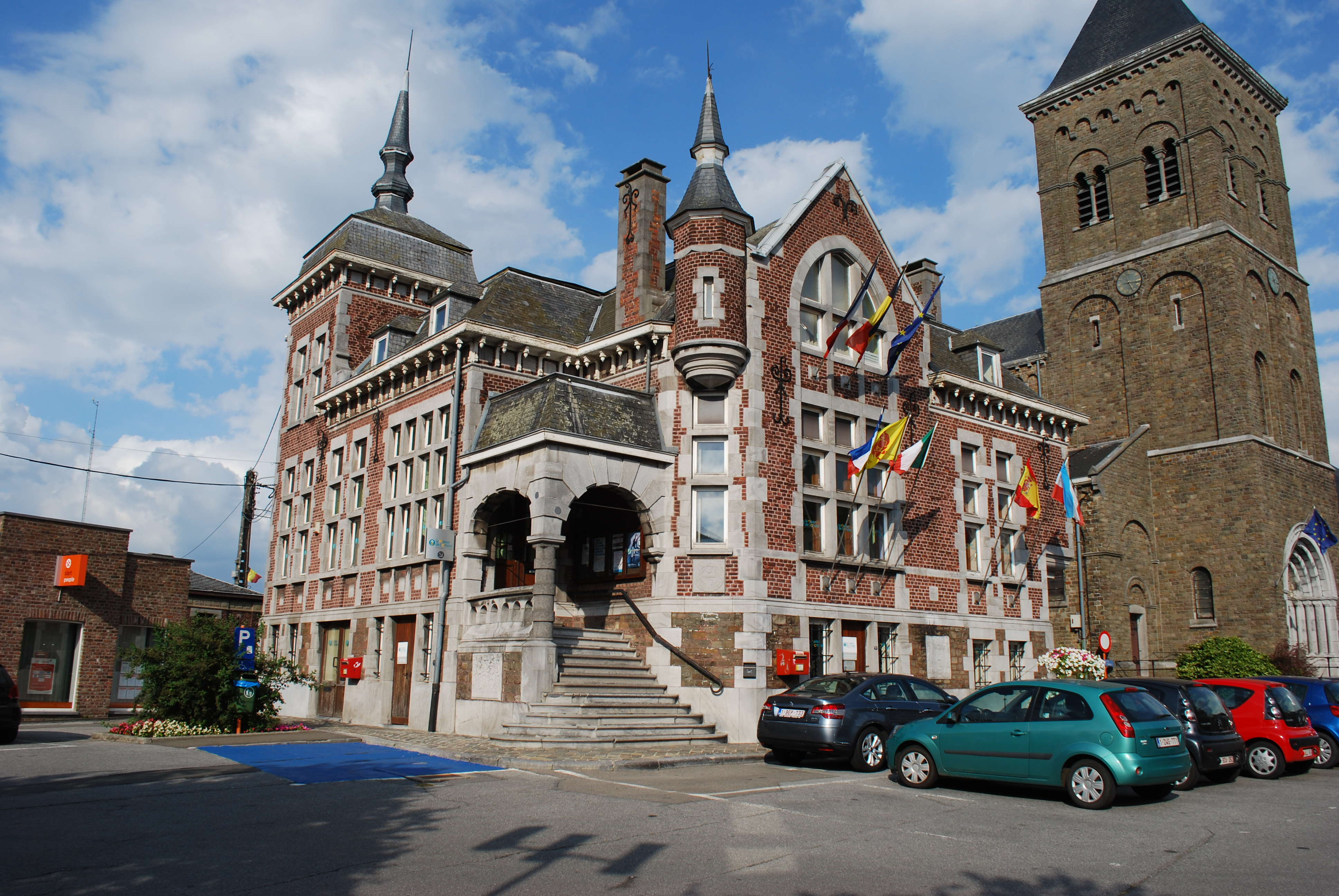 Vue de Battice.